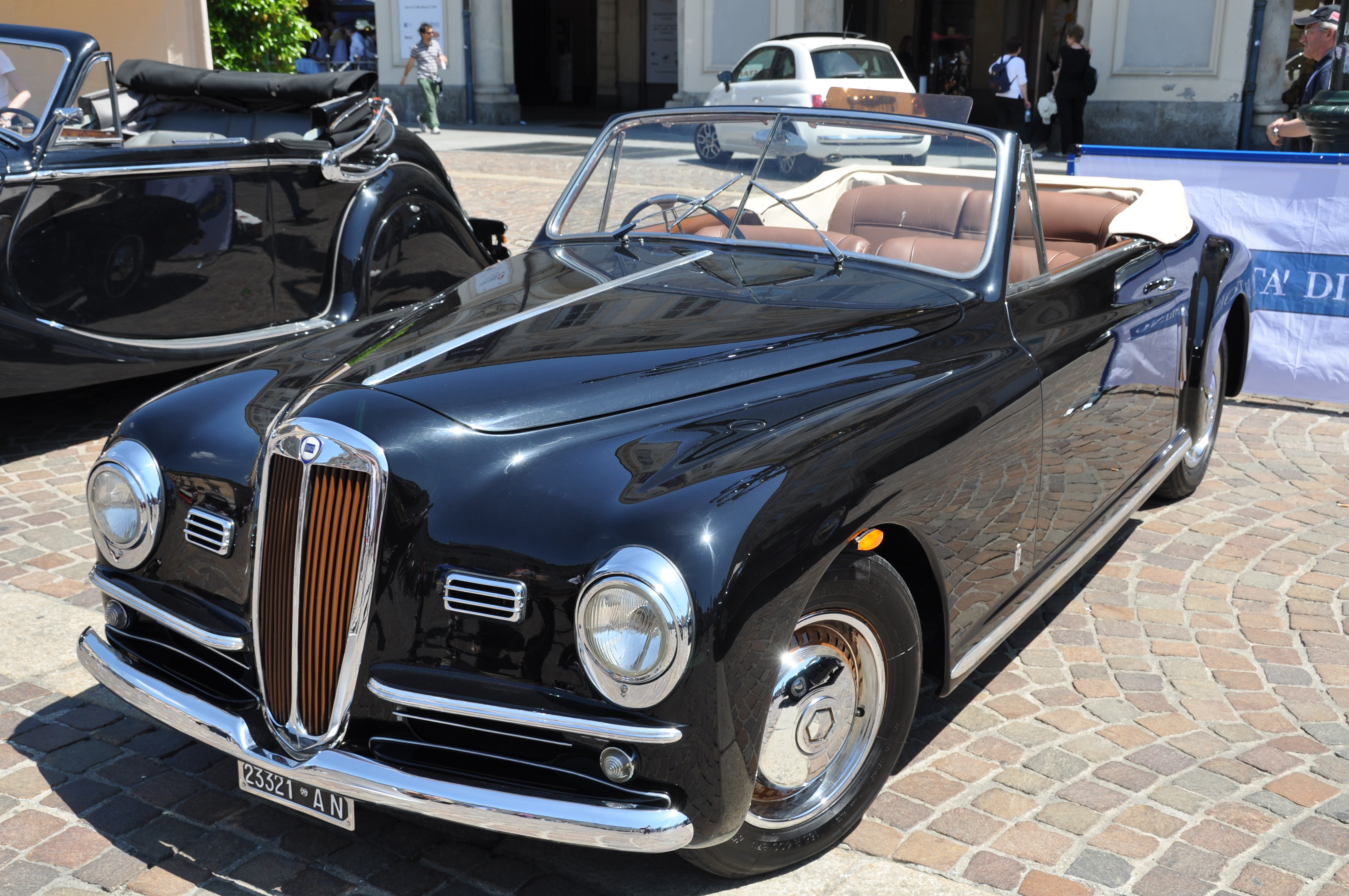 1949 Lancia Aprilia convertibile by Farina Vintage cars (Le residenze sabaude)